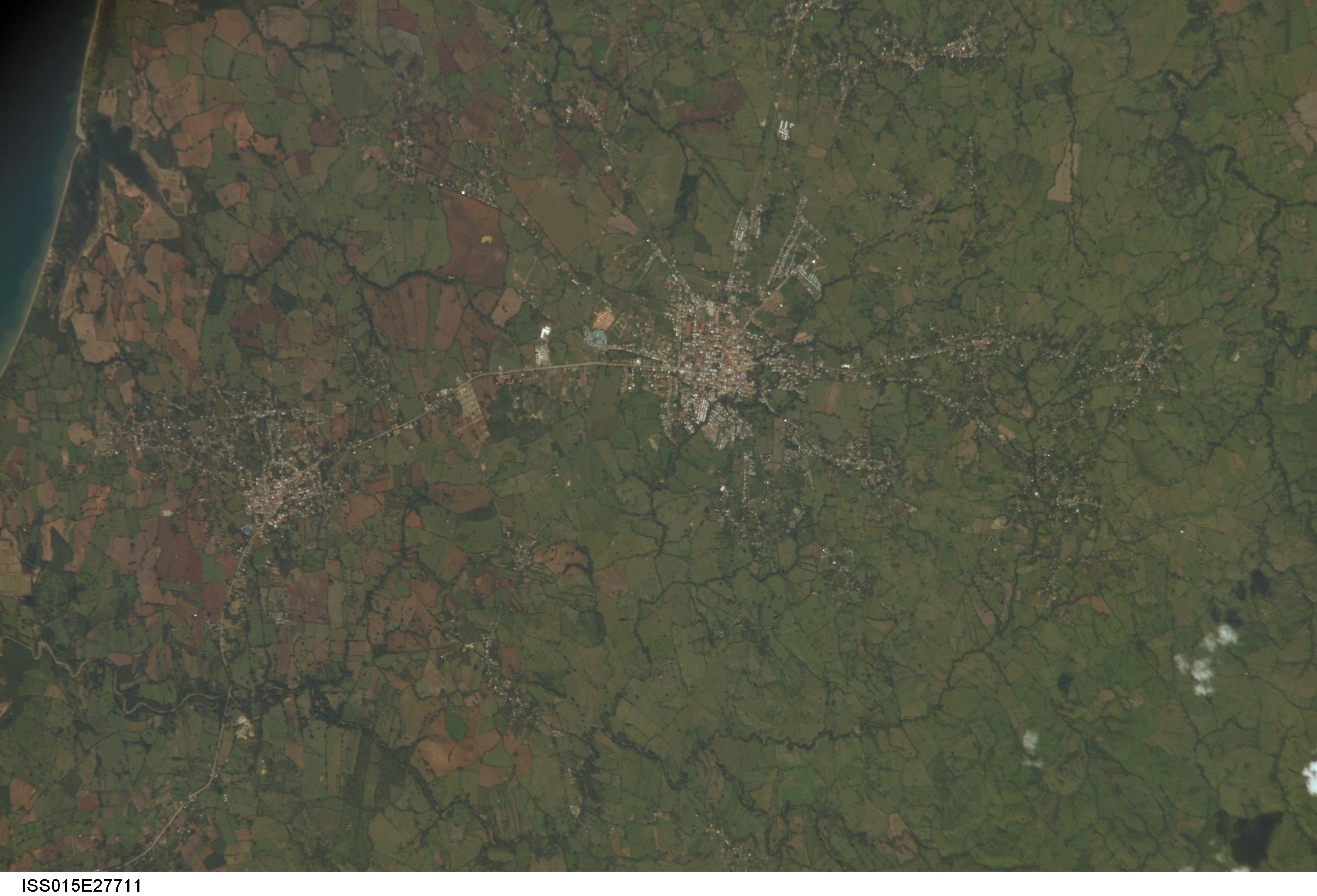 Imagen satelital de la ciudad de Las Tablas y el área agrícola circundante